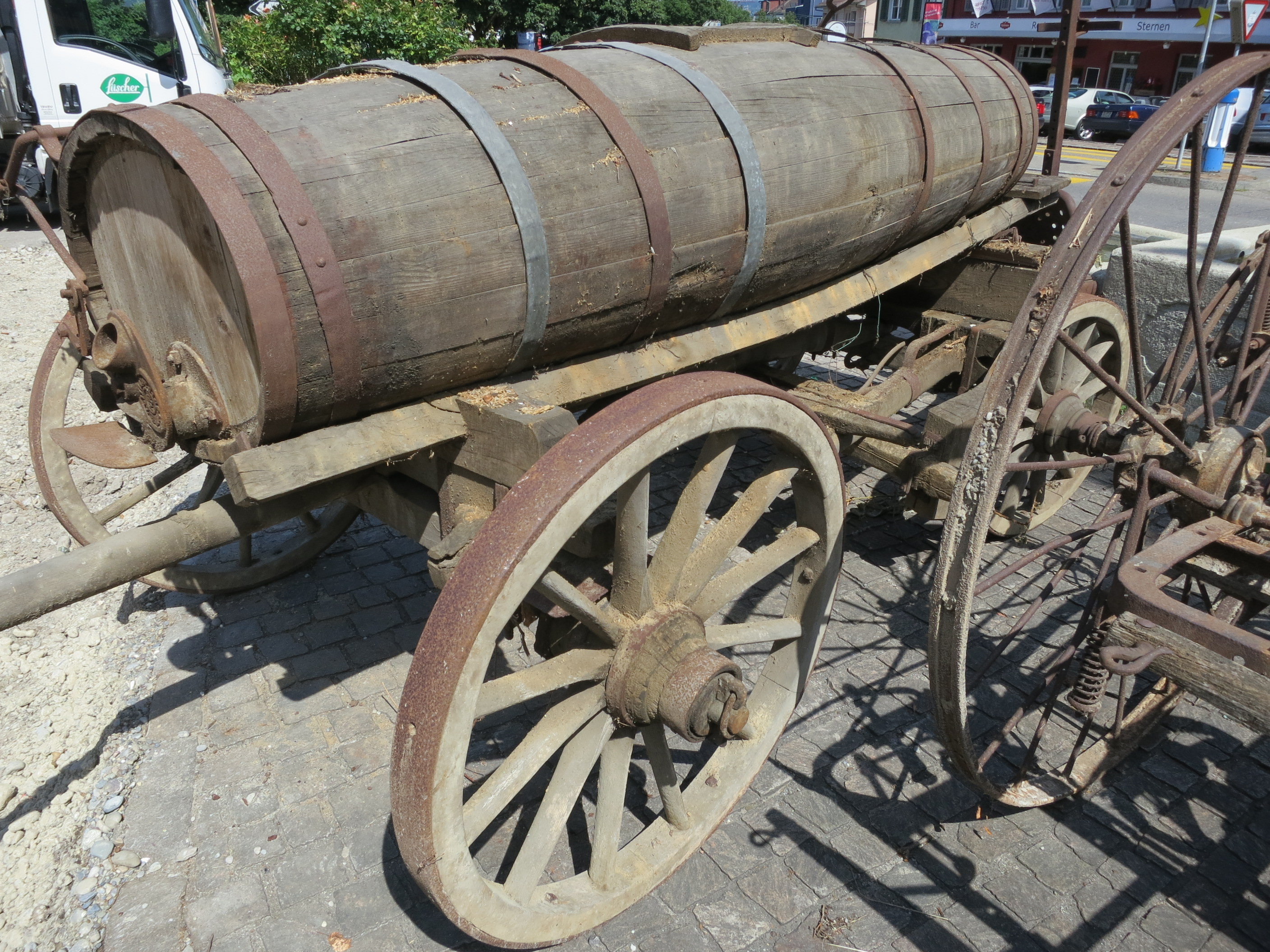 Güllenfass, Zürich-Albisrieden ZH, Schweiz